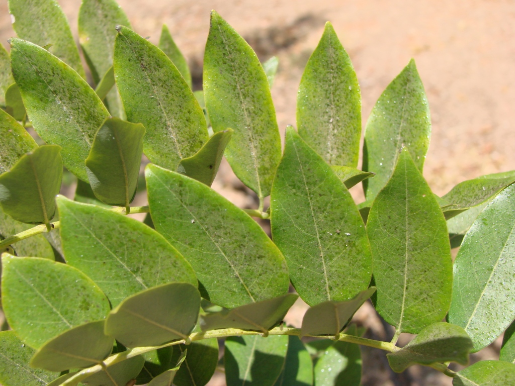 Gliricidia sepium (Jacq.) Kunth. ex Walp. - FABACEAE - Espécie que no Brasil ocorre na Caatinga (CE, PB e RN), cultivada no cerrado - SQN 204 Brasília - Distrito Federal - Brasil.